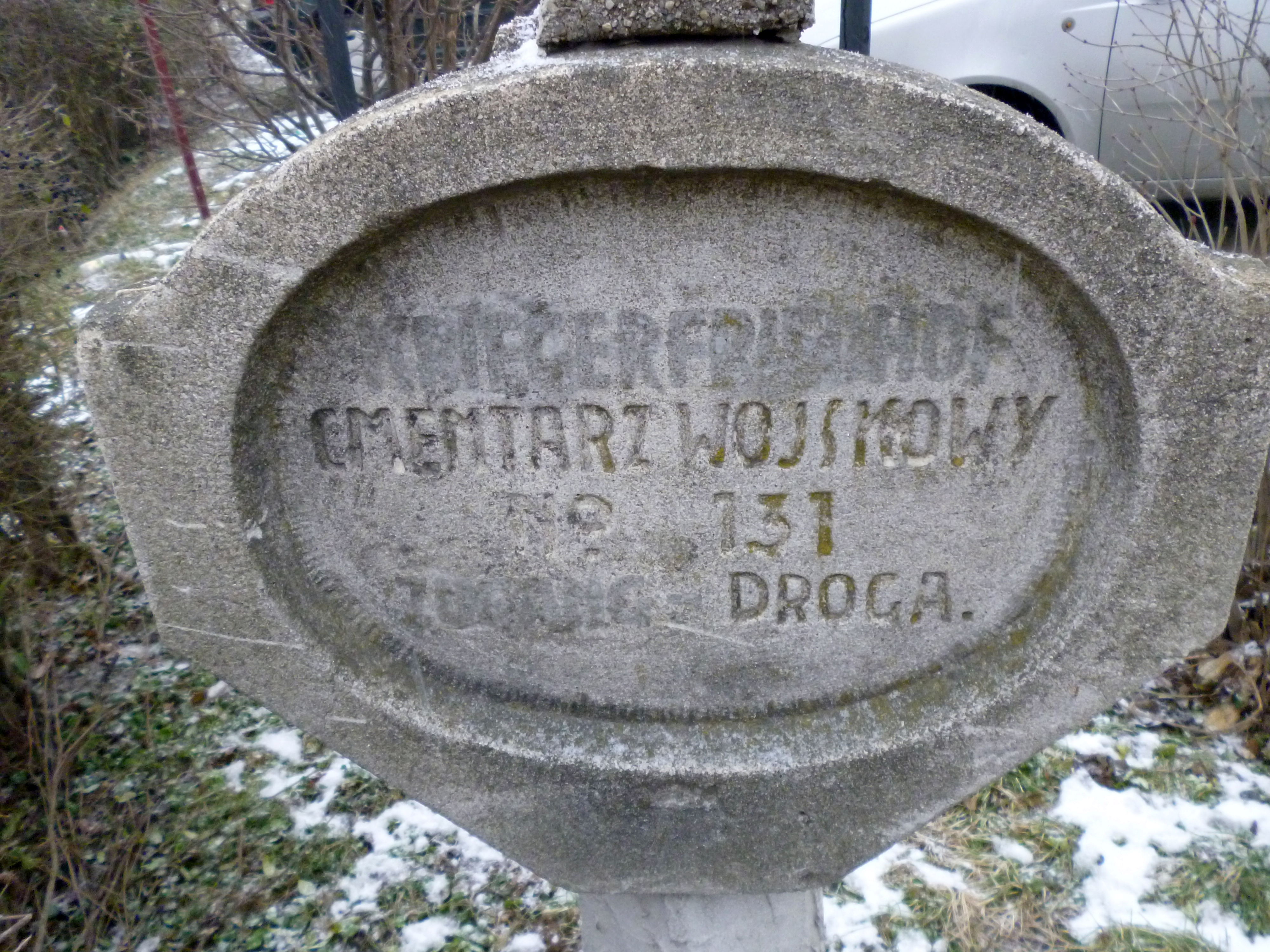 Tablica cmentarza wojennego nr.131 z 1915 roku , ustawiona w Stróżach na skrzyżowaniu dróg.